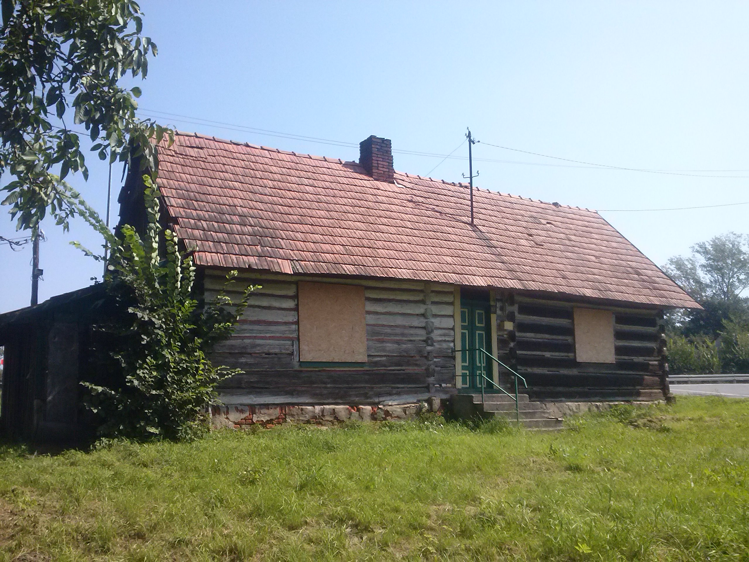 Dawna zabudowa drewniana w Tryńczy